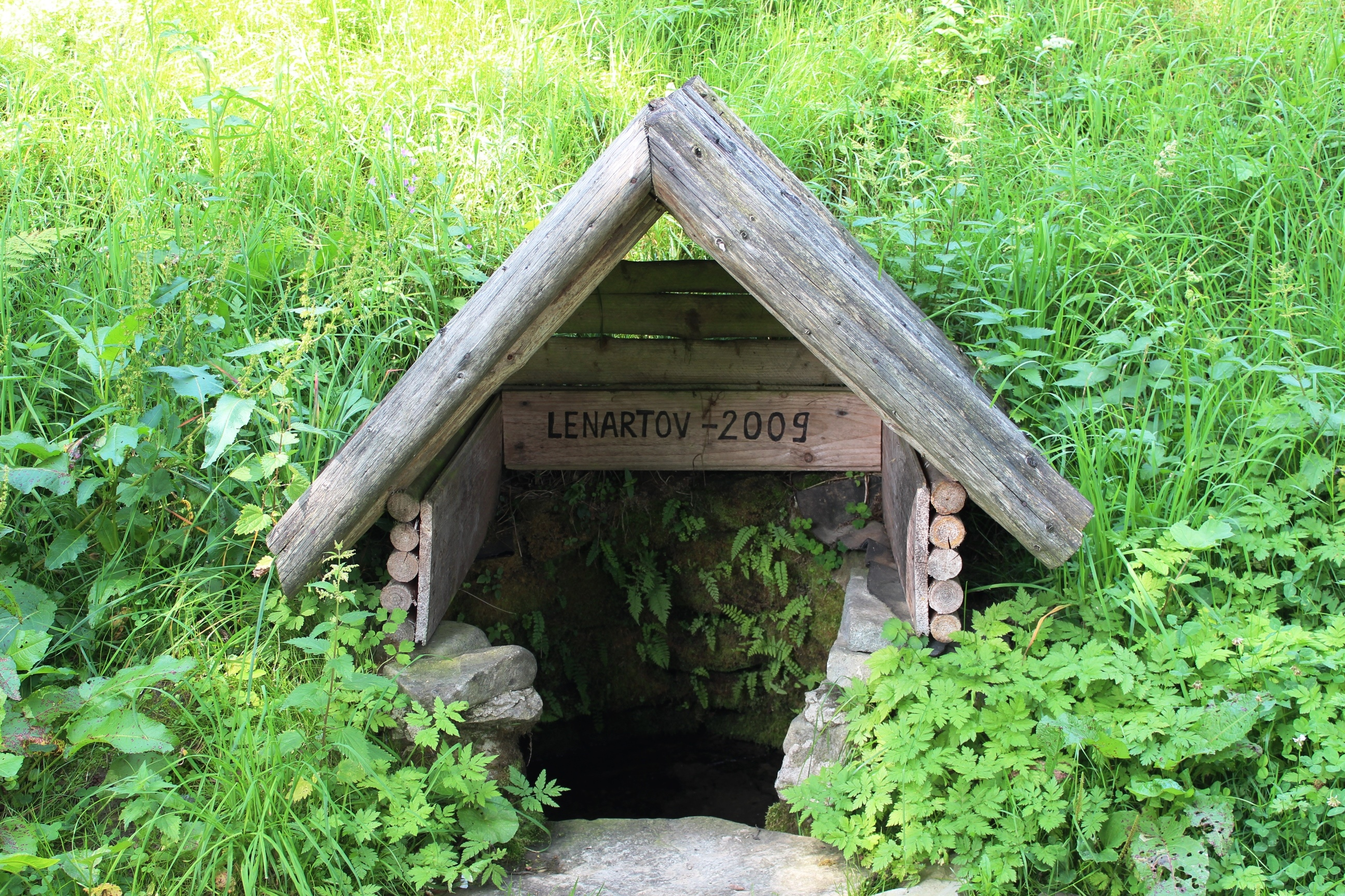 Królewska Studnia (Beskid Sądecki)